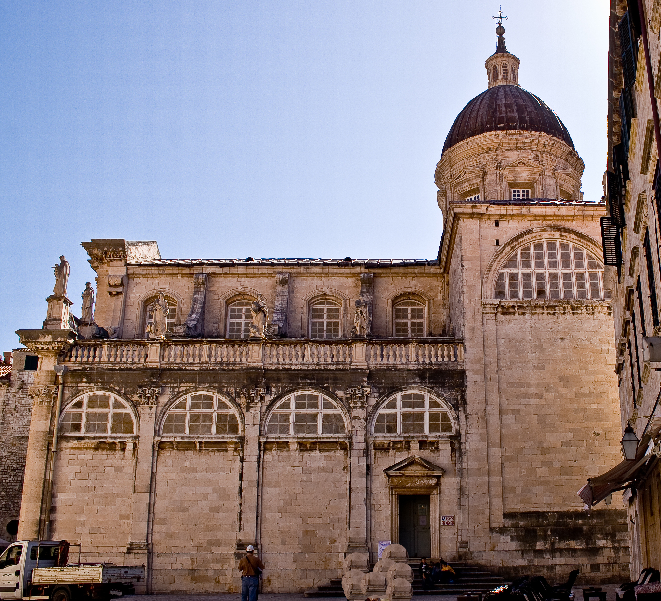 Nordseite: Kathedrale Mariä Himmelfahrt (Velika Gospa) in Dubrovnik (Kroatien)